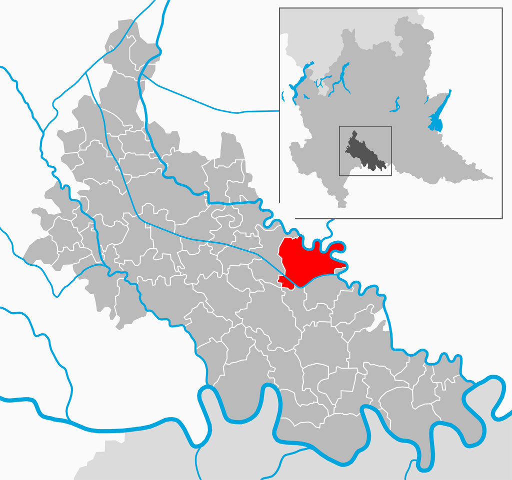 Il comune di Bertonico nella provincia di Lodi